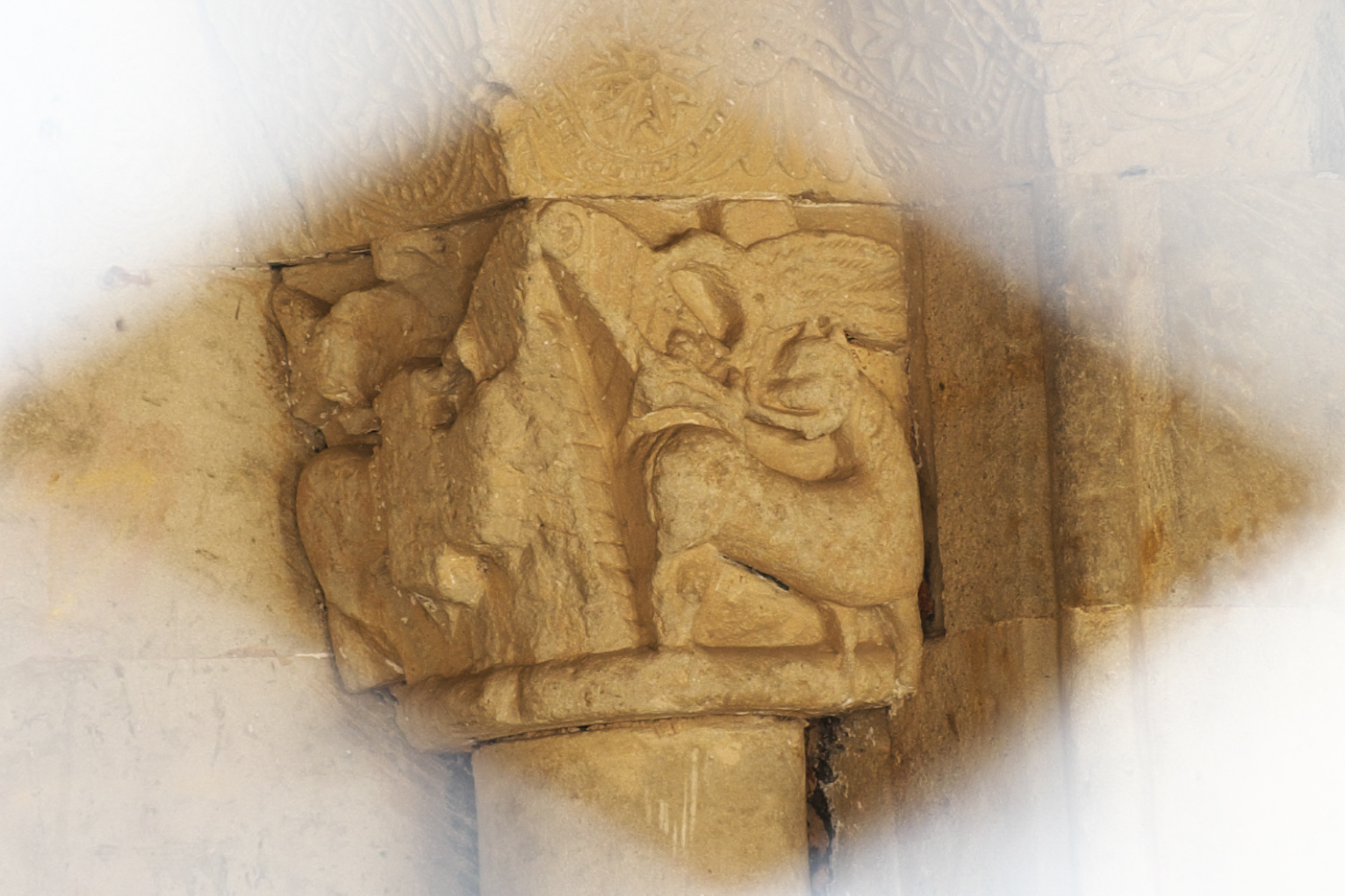 Kirche Santa María in Almenara de Tormes in der Provinz Salamanca Provinz Salamanca (Kastilien-León/Spanien), aus dem 12. Jahrhundert, Kapitell am Südportal